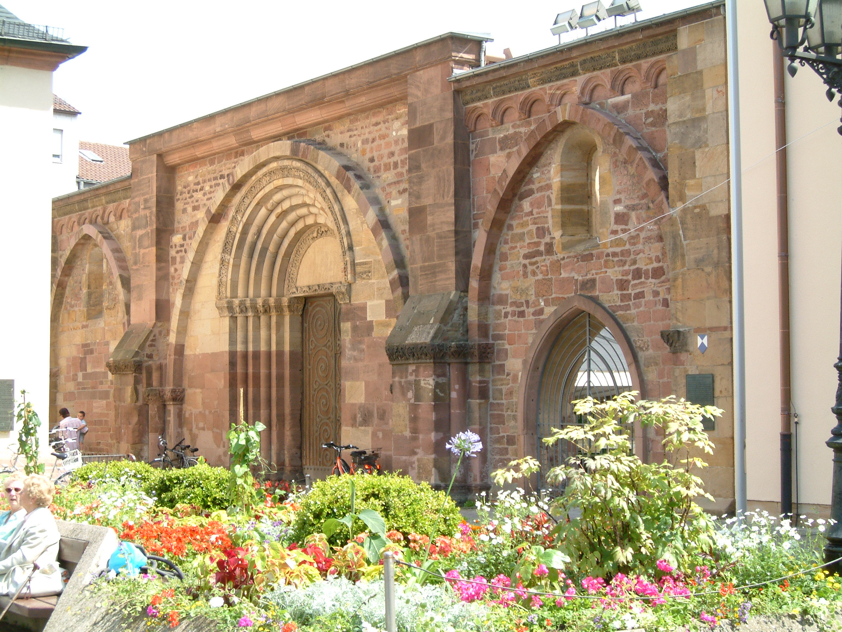 Erkenbert-Ruine zu Frankenthal (Pfalz), selbst fotografiert am 2006-06-09 und freigegeben durch Benutzer:Mundartpoet